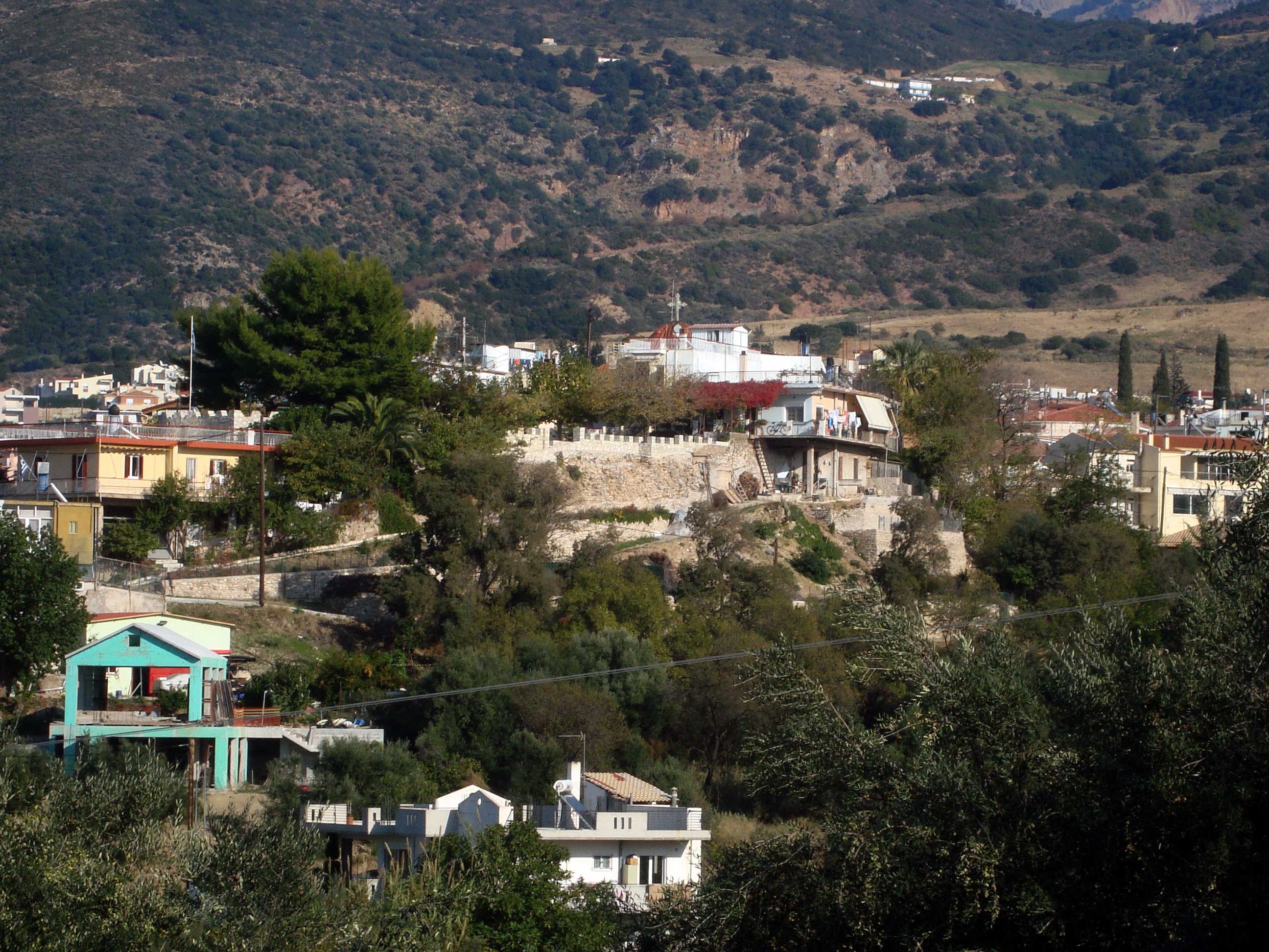 Το τοιχίο που διασώζεται από το κάστρο του Σαραβαλίου Unknown